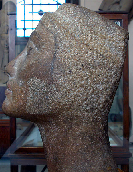 Plemkinja Nefertiti, Kairski muzej. Slikano z dovoljenjem brez bliskavke